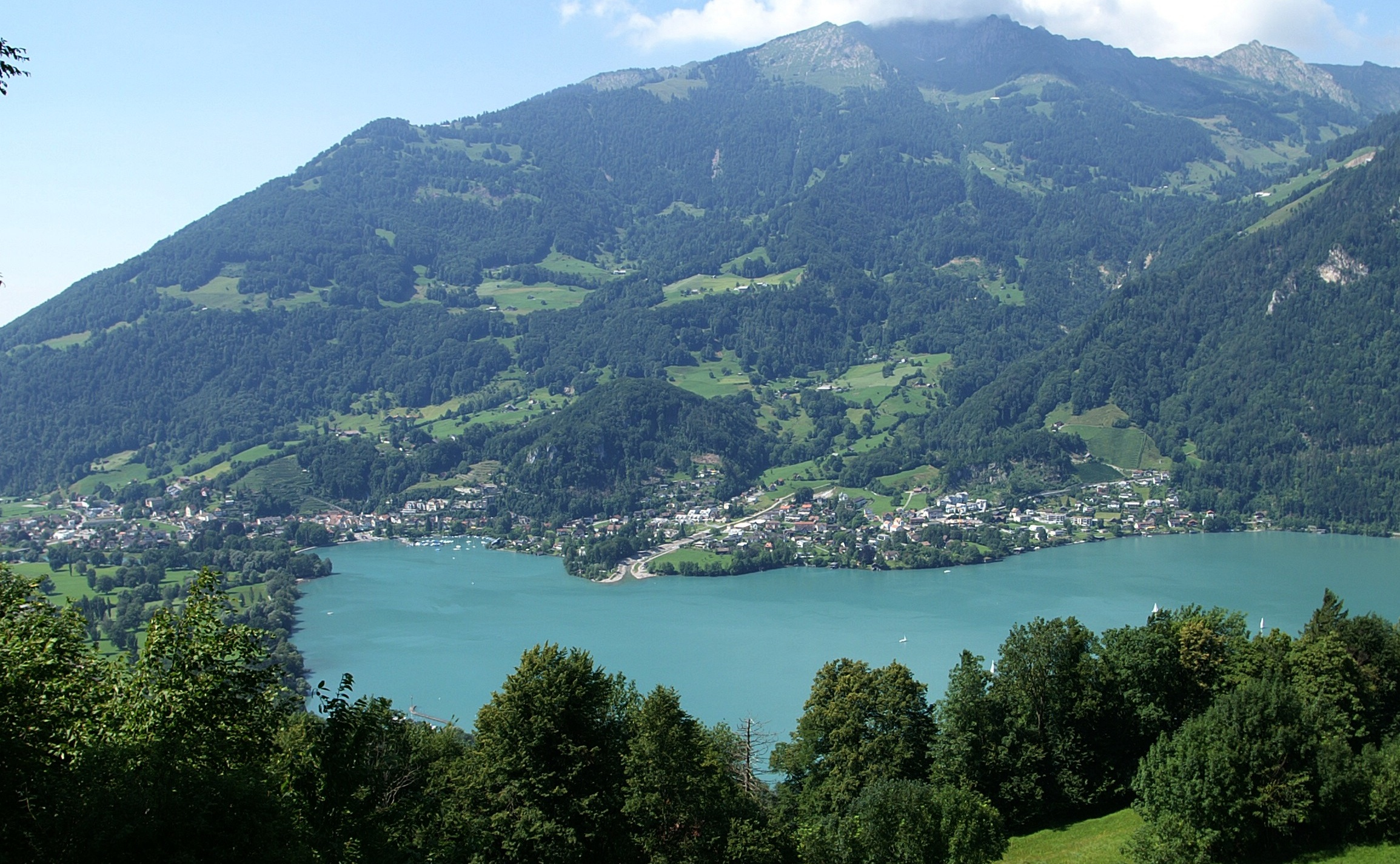 Weesen ist eine politische Gemeinde im Kanton St. Gallen. Sie liegt am Westufer des Walensees. Blick von Filzbach, auf dem Kerenzerberges.